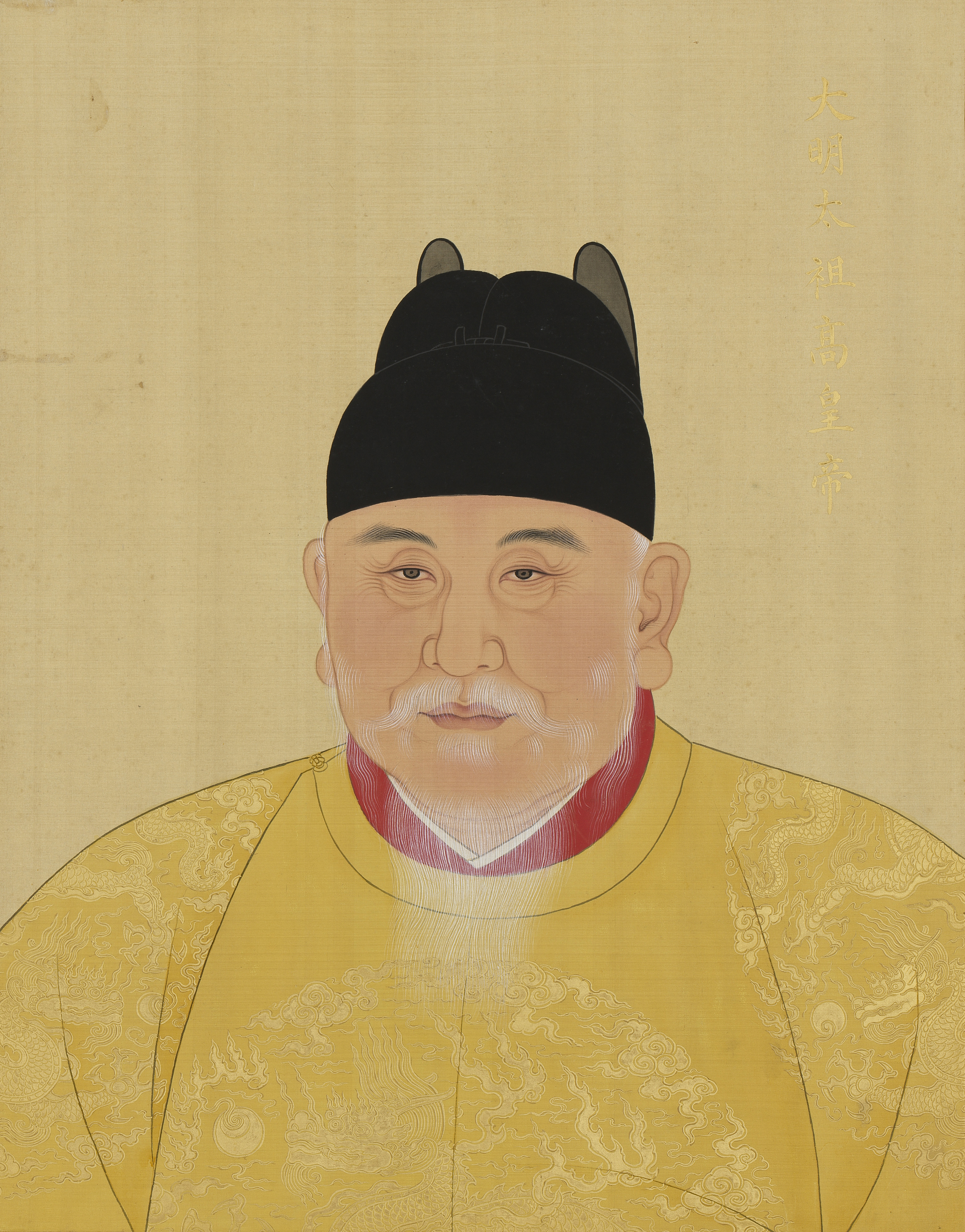 中文（中国大陆）: 作者已经去世超过200年，作品已经进入公有领域。